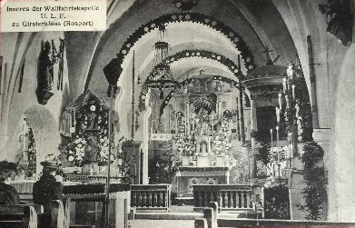 D'Kapell Giischterklaus, Postkaart vum J.M. Bellwald.